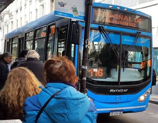 Unidad de la línea 116, de la empresa Movi, explotadora de la línea